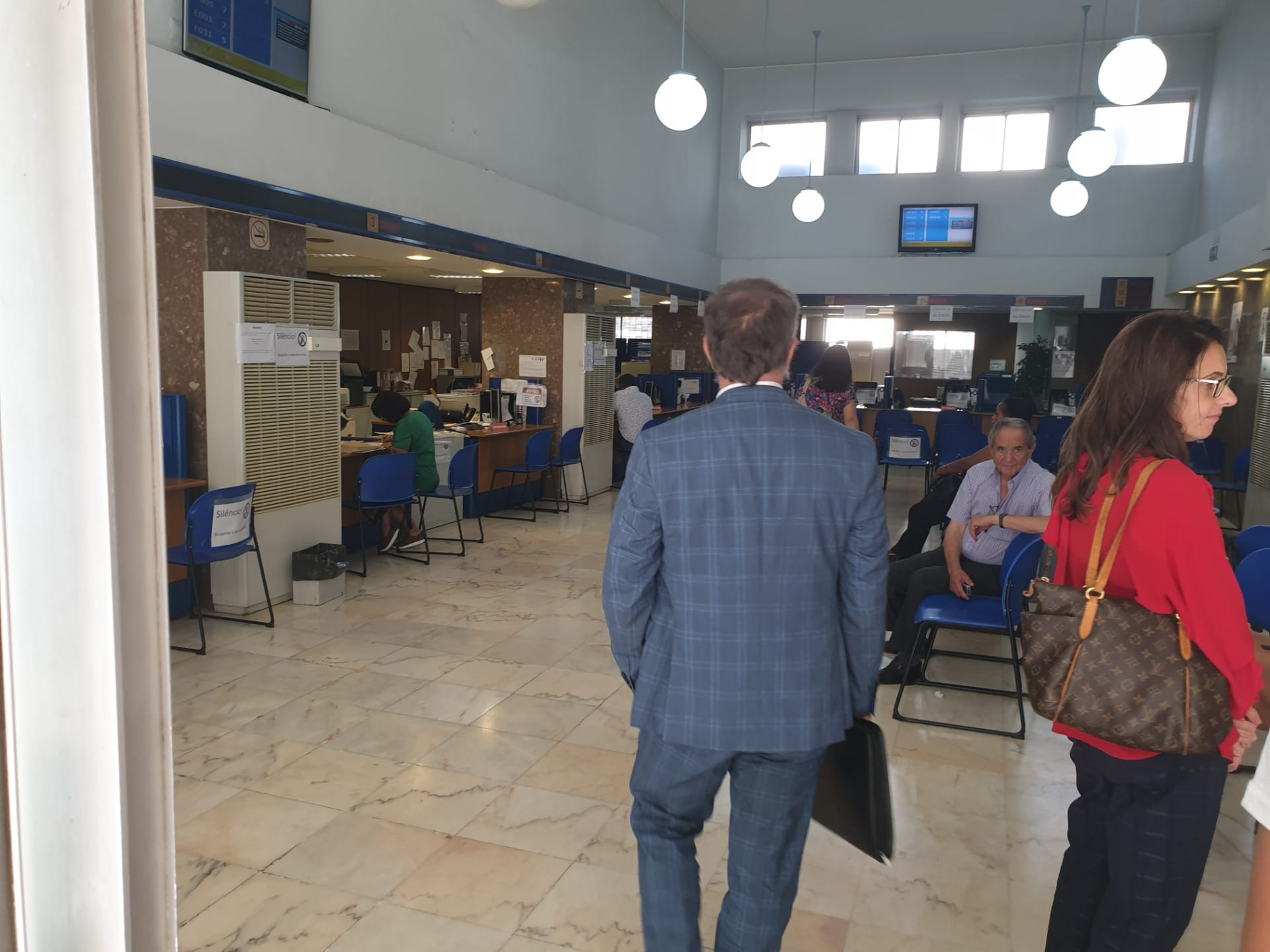 Conservatória dos Registos Centrais (IRN). Rua Rodrigo da Fonseca 198, Lisboa